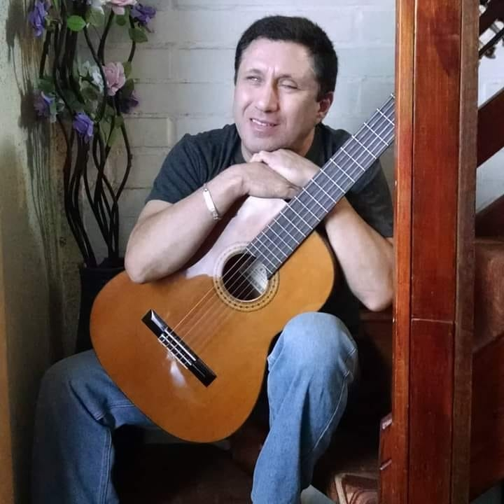 en la escalera de nuestra casa (2020)